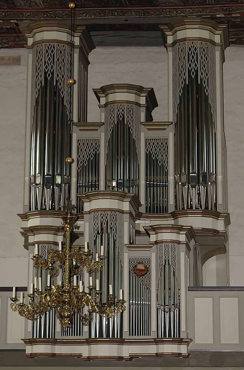 Kirche St. Lorenz (17.Jh.) in Lübeck-Travemünde: Beckerath-Orgel von 1966, Orgelprospekt 1991 umgebaut